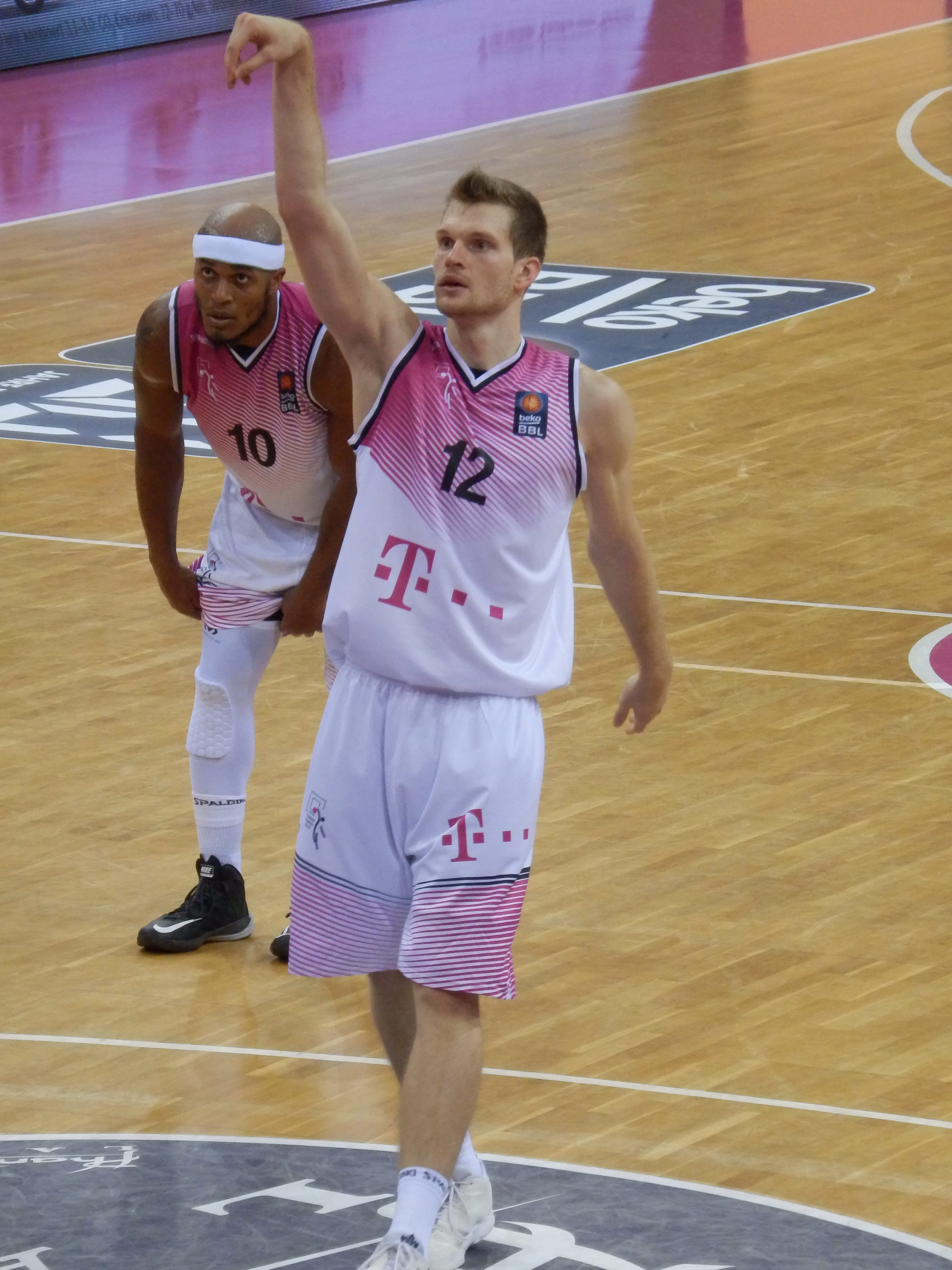 Florian Koch und Eugene Lawrence beim Spiel der Telekom Baskets Bonn gegen den MBC am 7. Oktober 2015.